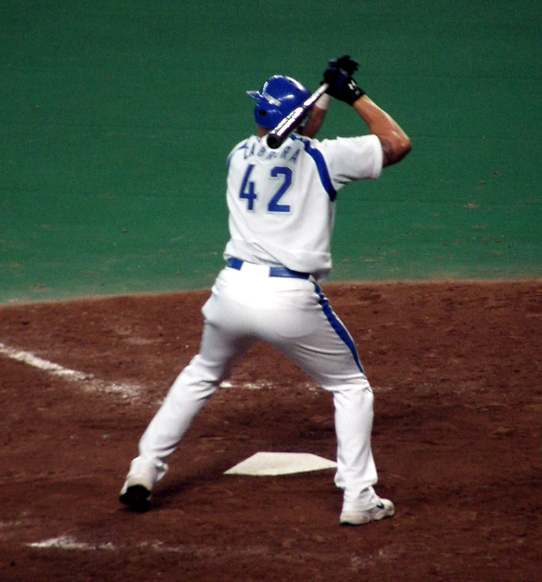 Alex Cabrera